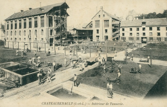 Cette image représente des ouvriers au travail dans l'intérieur d'une tannerie à Château-Renault